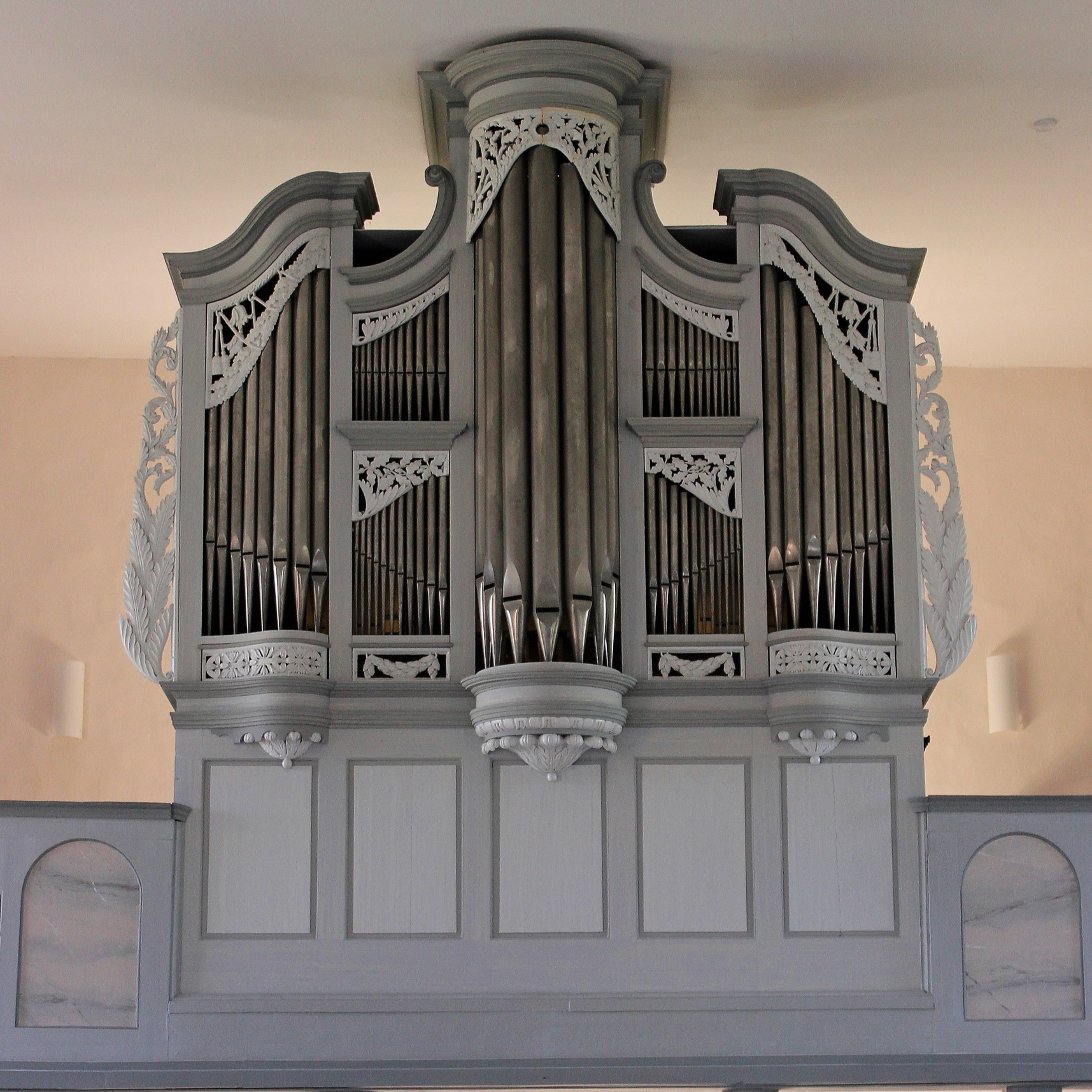 Orgelprospekt der evangelischen Kirche in Wolfersweiler, Gemeinde Nohfelden, Landkreis St. Wendel, Saarland